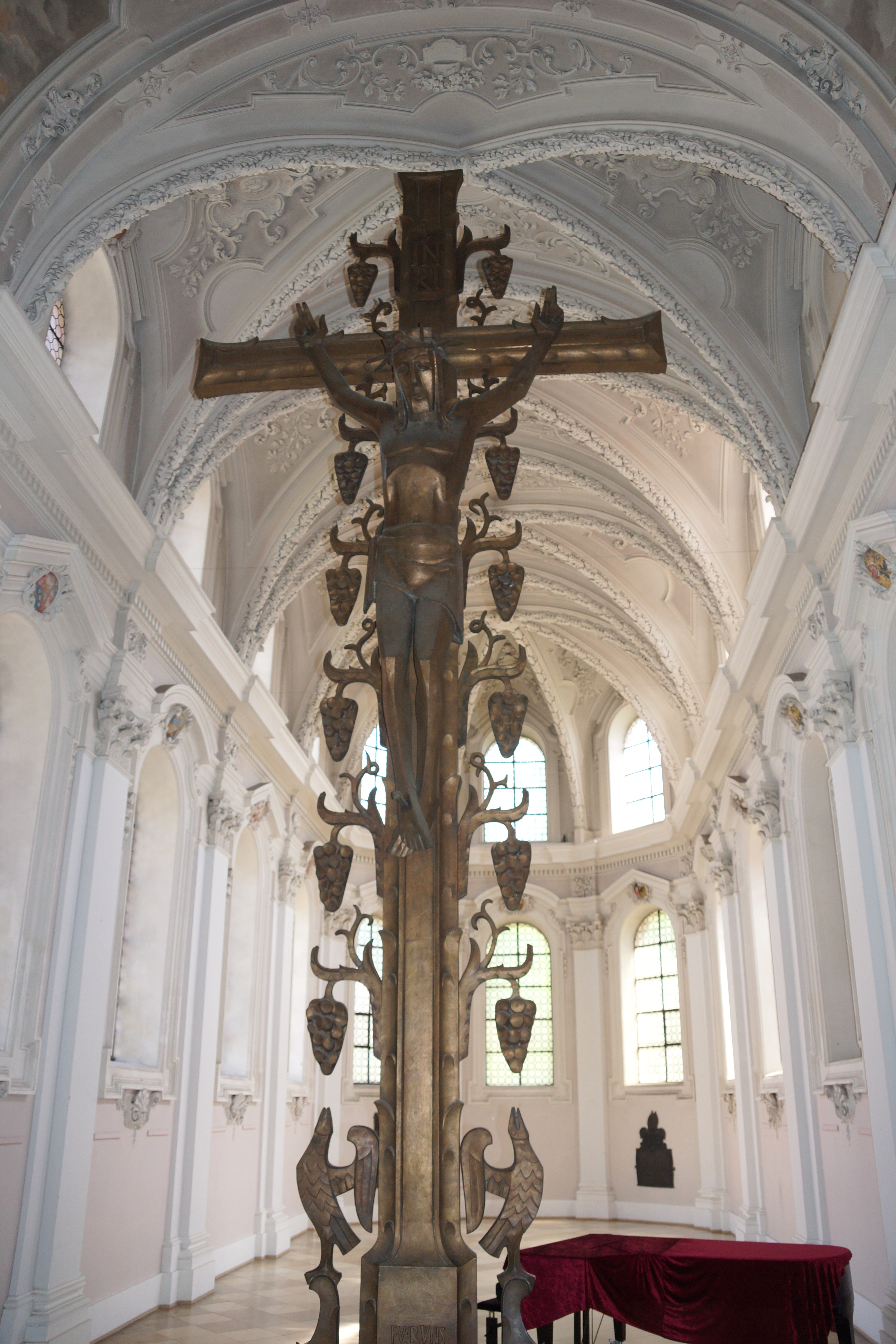 St. Egidien / Egidienkirche in Nürnberg